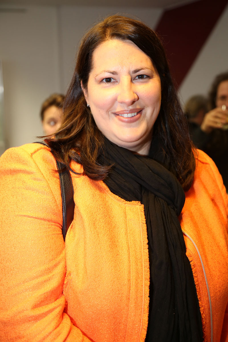 Kathrin Gaál-2423